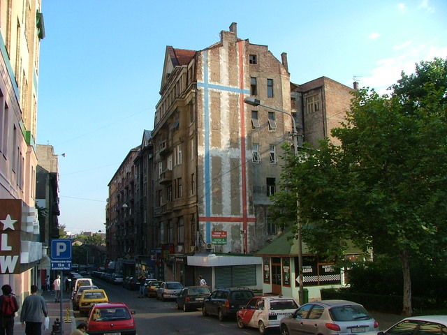 Mural on Balkanska 2 building, Belgrade.